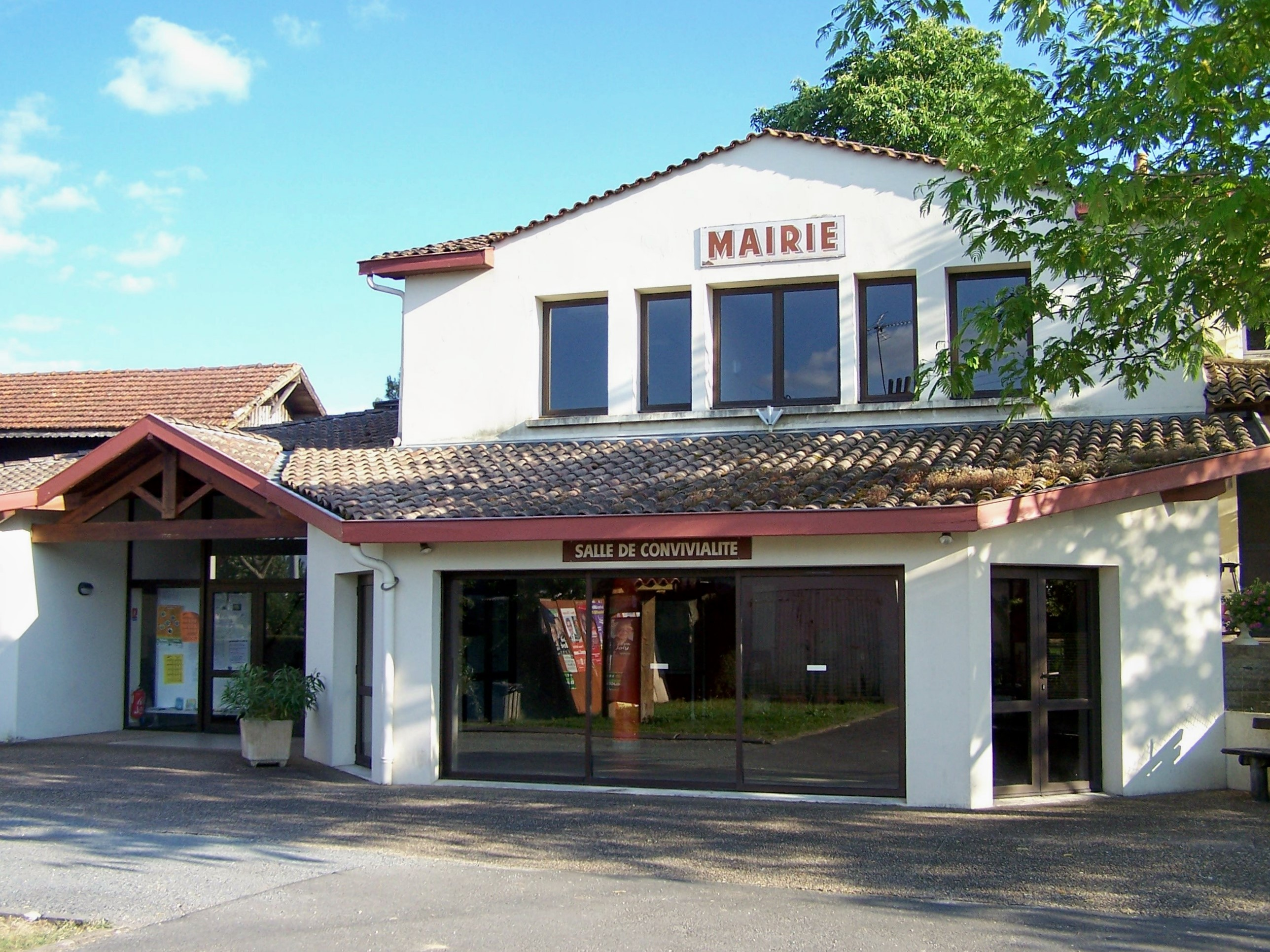 Mairie de Bassanne, Gironde, France